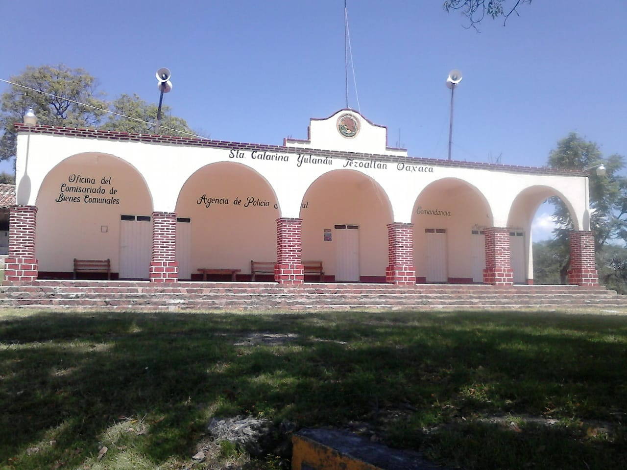 Agencia Santa Catarina Yutandú